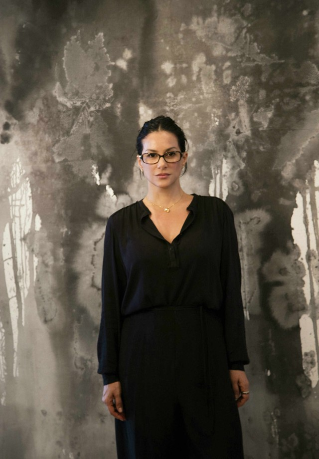 Paula Klien Invisibilities